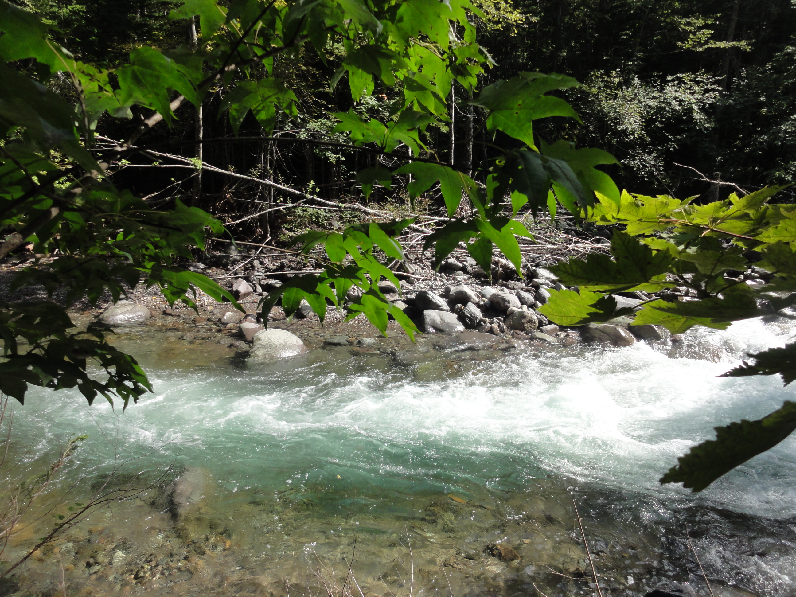 В устье Средней Амгу